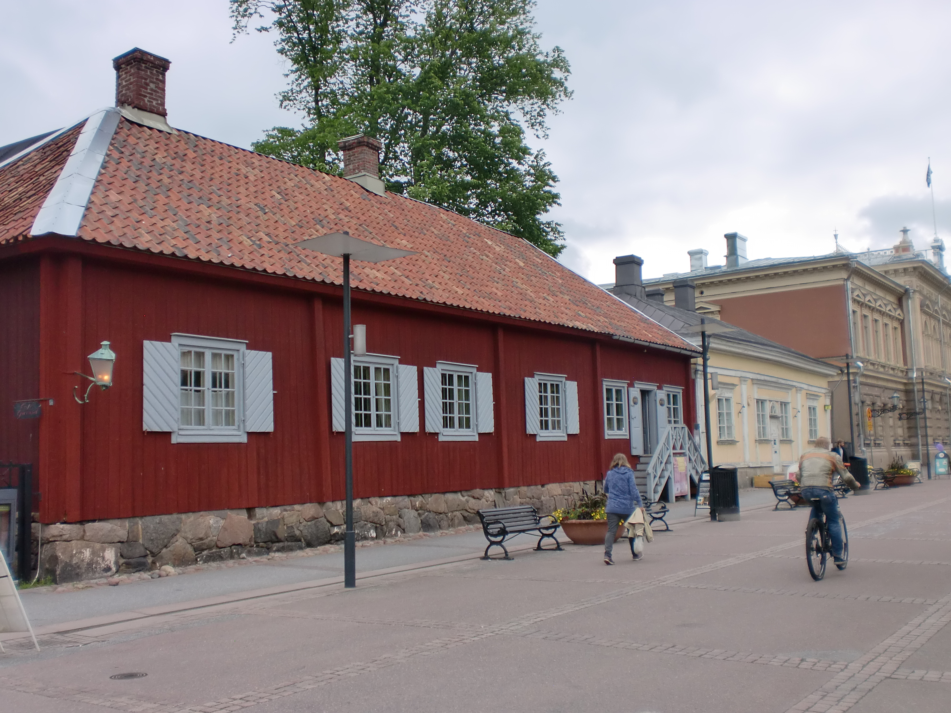 Qwenselin talo; historic house in Turku, Finland This is a photo of a monument in Finland identified by the ID 'Qwensel House' (Q4356801)